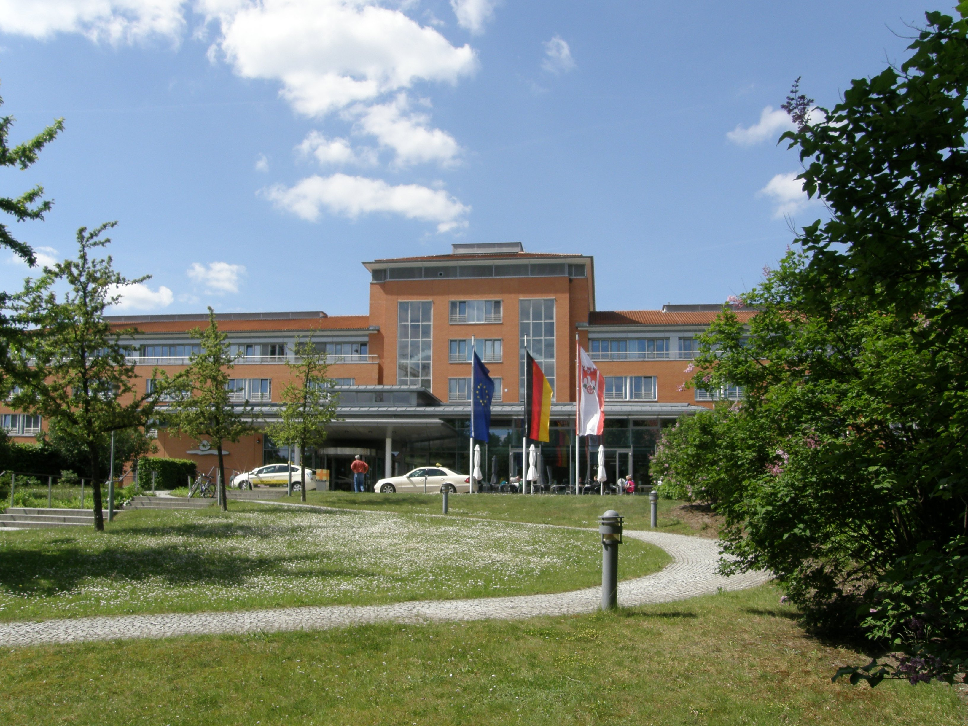 Berlin-Weißensee, Schönstraße, Park-Klinik